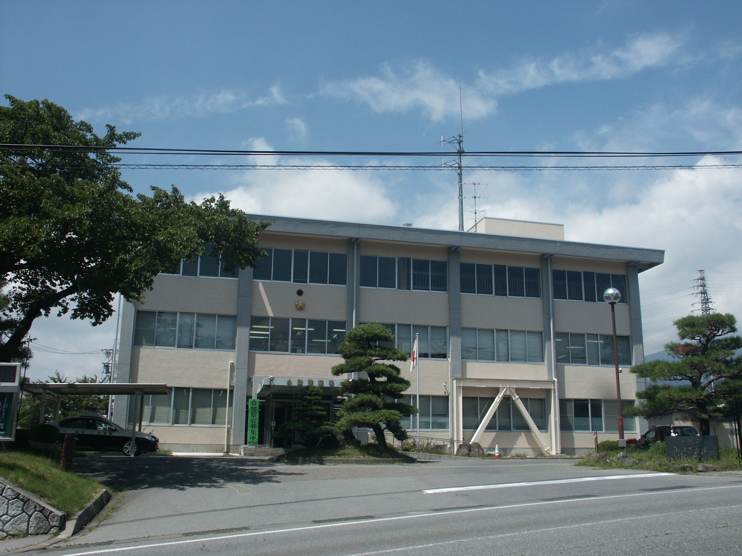 小諸警察署庁舎